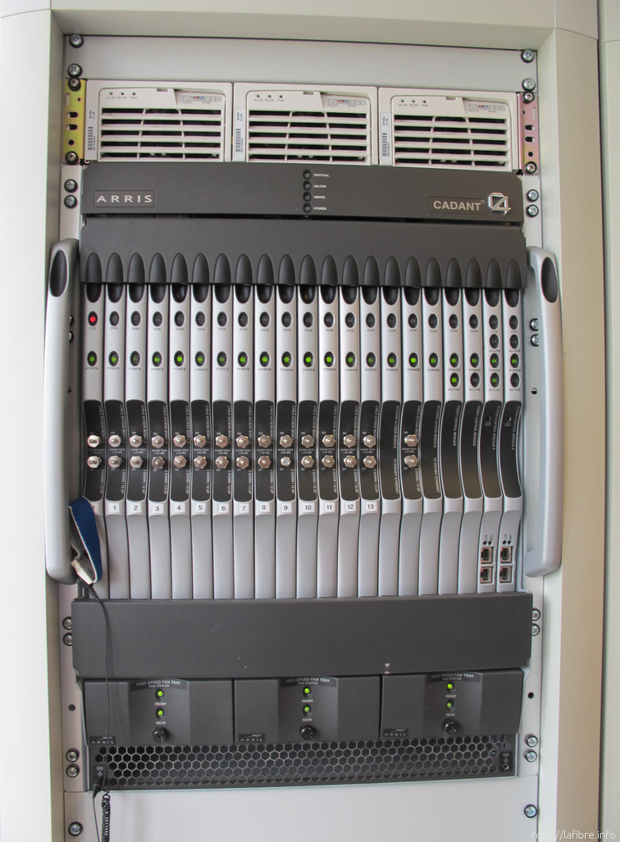 CMTS Arris Cadant C4 CityPlay Amiens